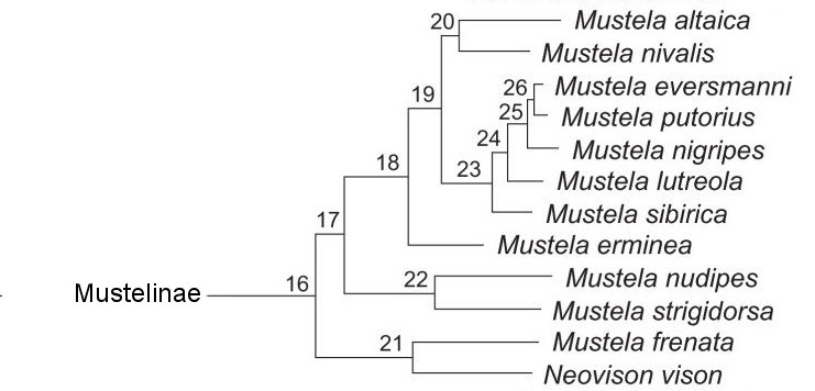 Cladogramme pour les Mustelinae.This file was derived from: Bayesian consensus phylogram for the Mustelidae.jpg